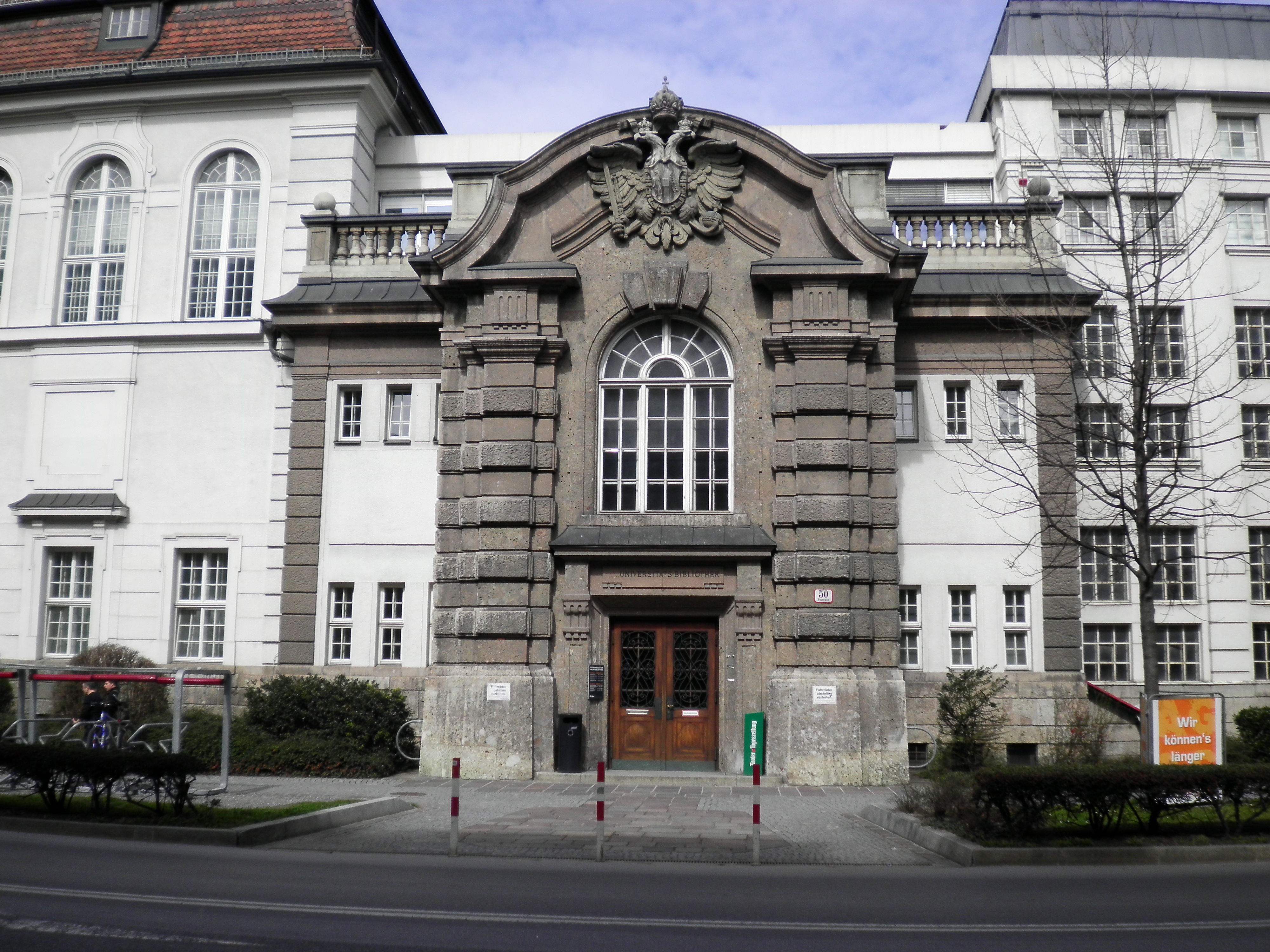 ULB-Tirol; Innsbruck Innrain; Haupteingang Altbau